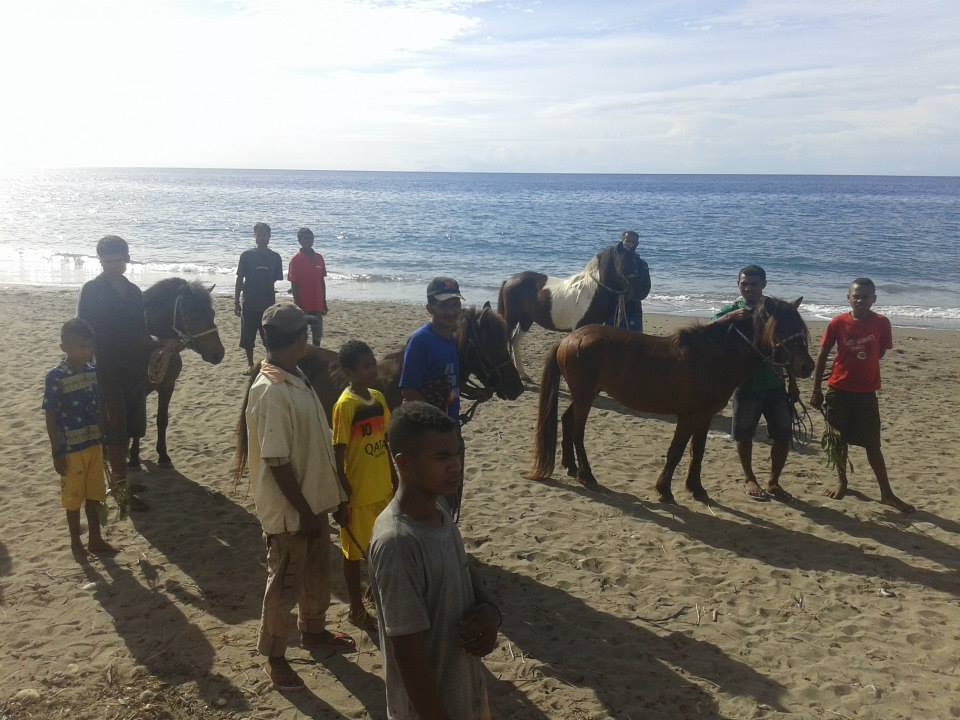 Oecusse